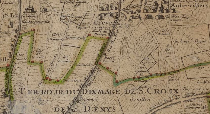 Saint-Denis.Inselin.1707.Cornillon.Franc-Moisin